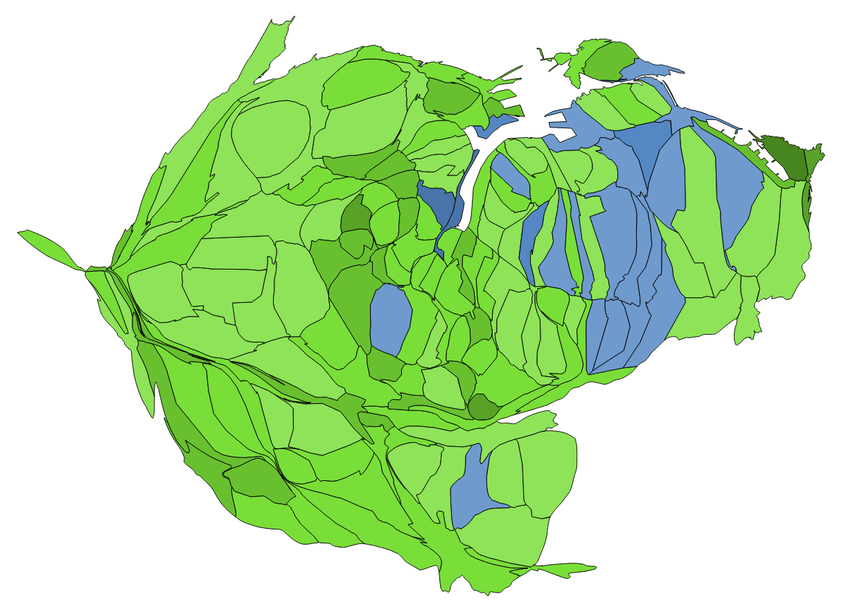 顏色對照表